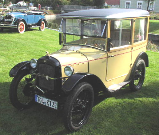 Dixi